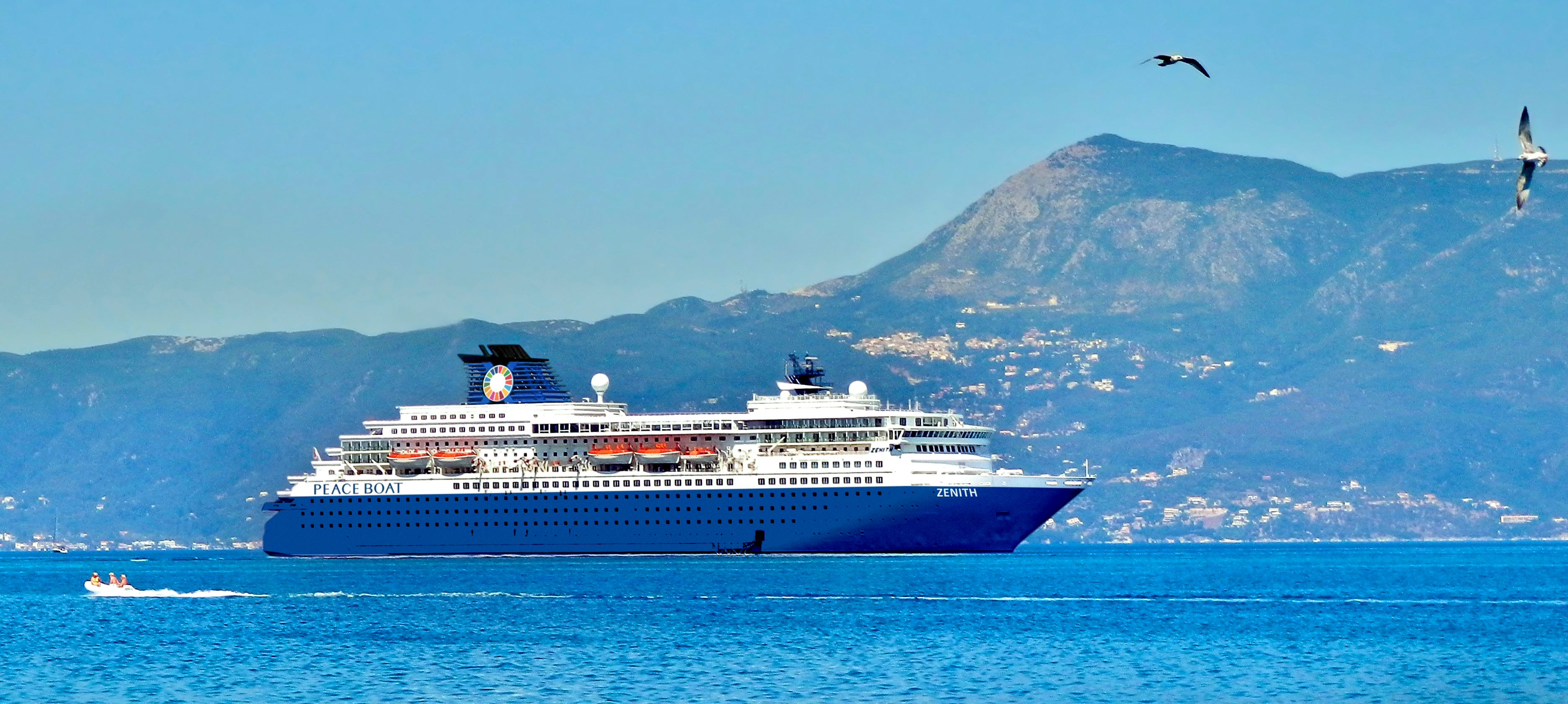 （2020年−現在使用）